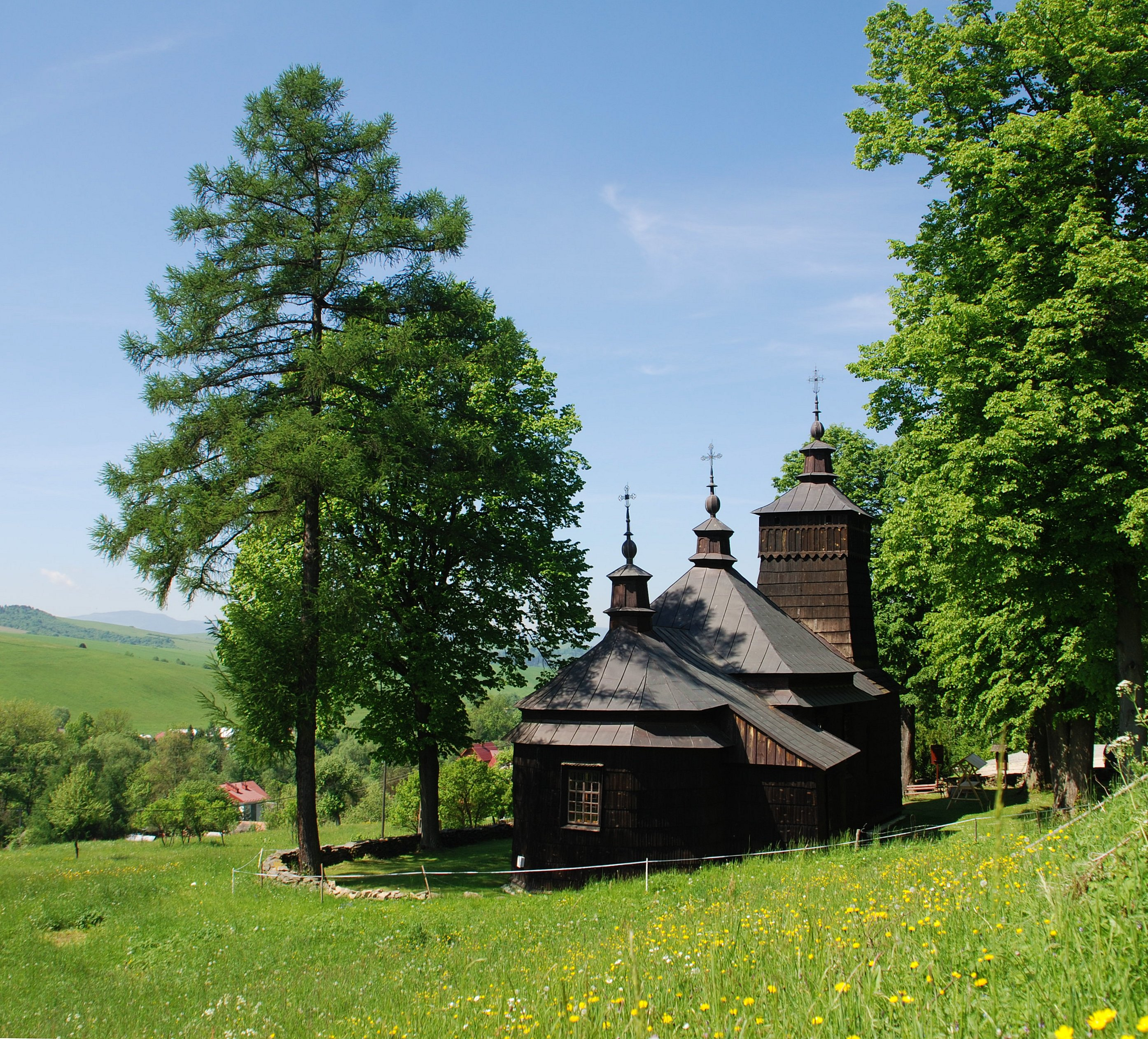 Park krajobrazowy Popradzki Park Krajobrazowy.